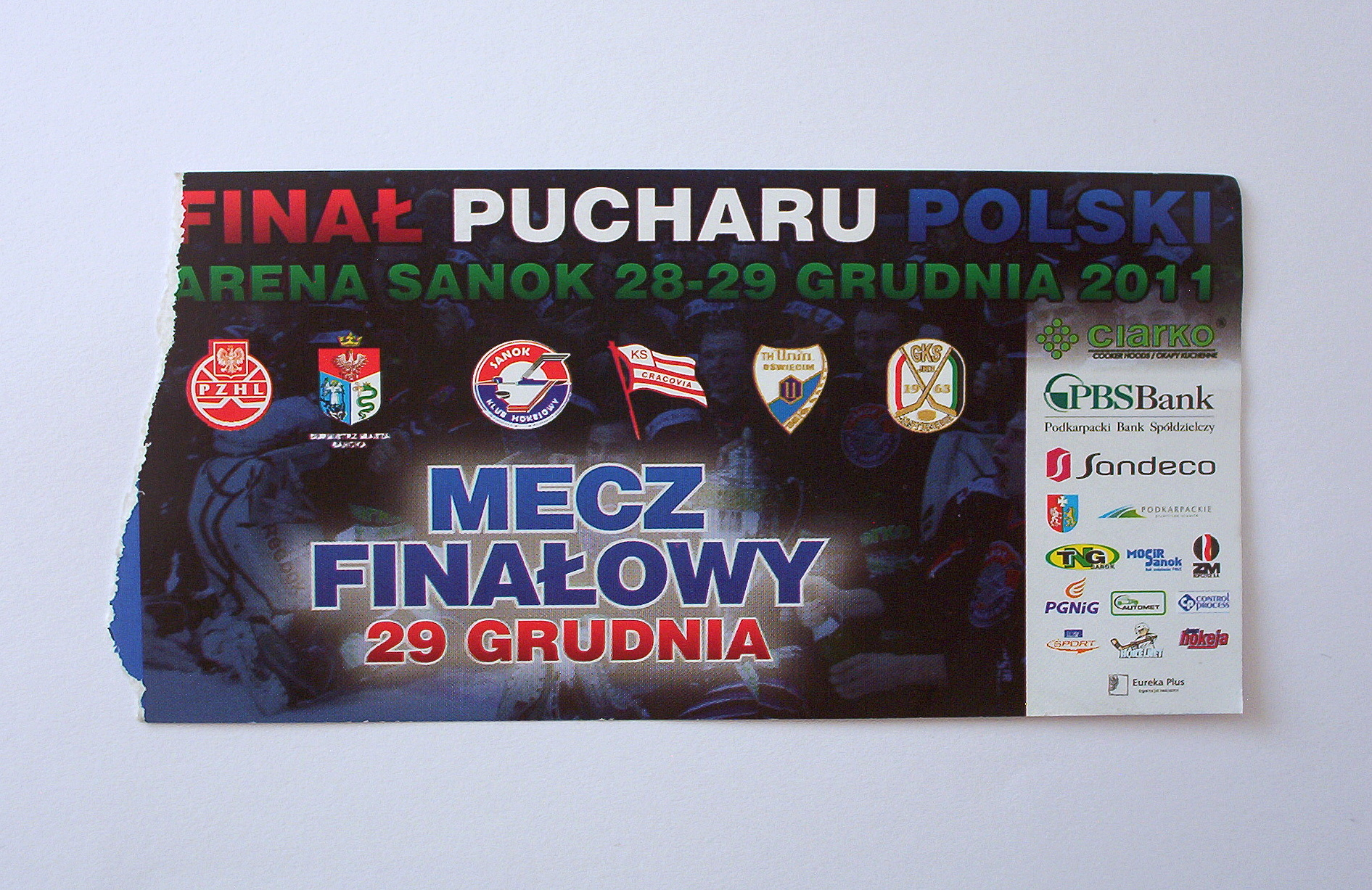 Bilet na turniej finałowy Pucharu Polski w hokeju na lodzie 2011.